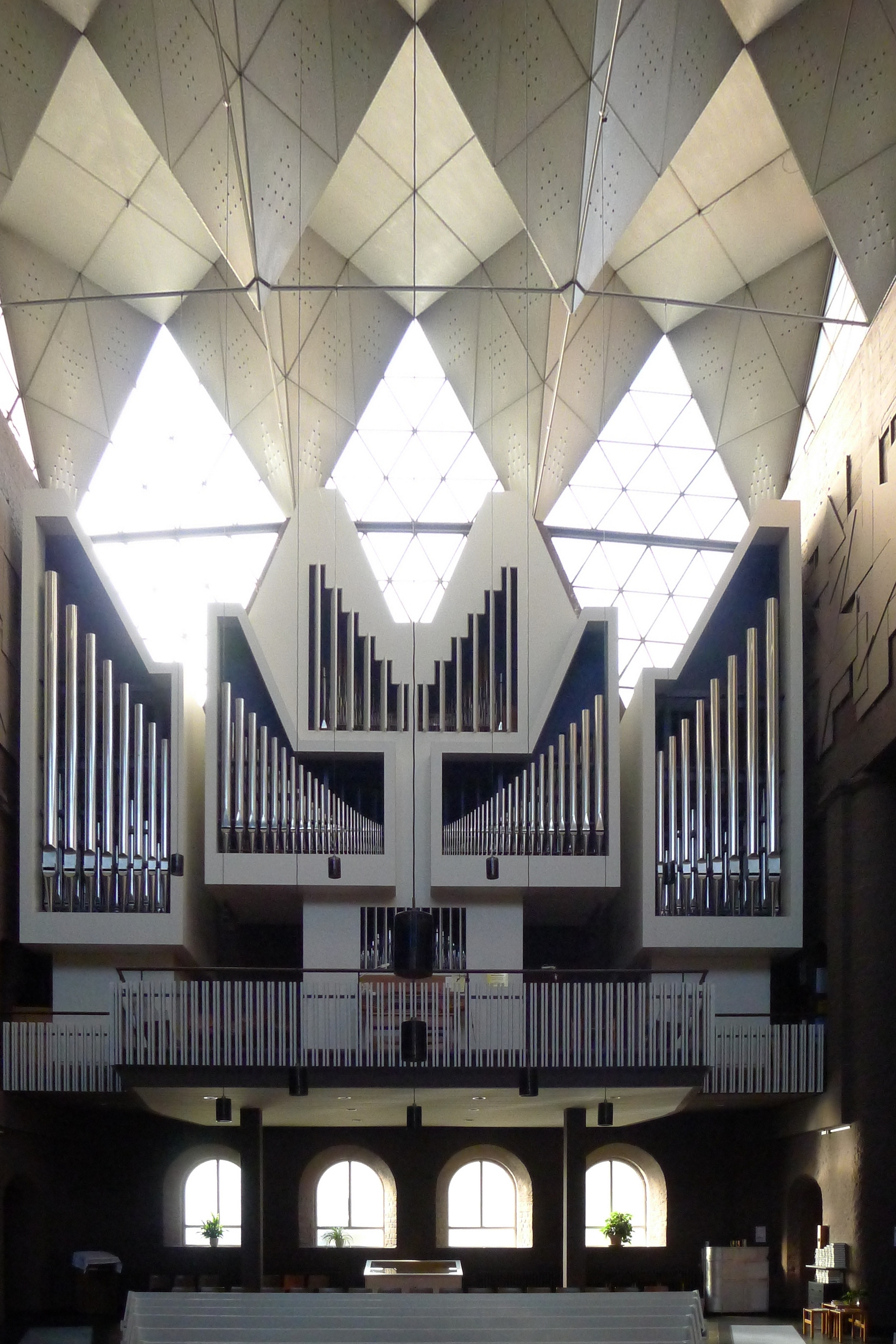 Orgel der Kirche